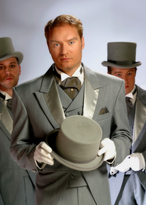 Mart Sander